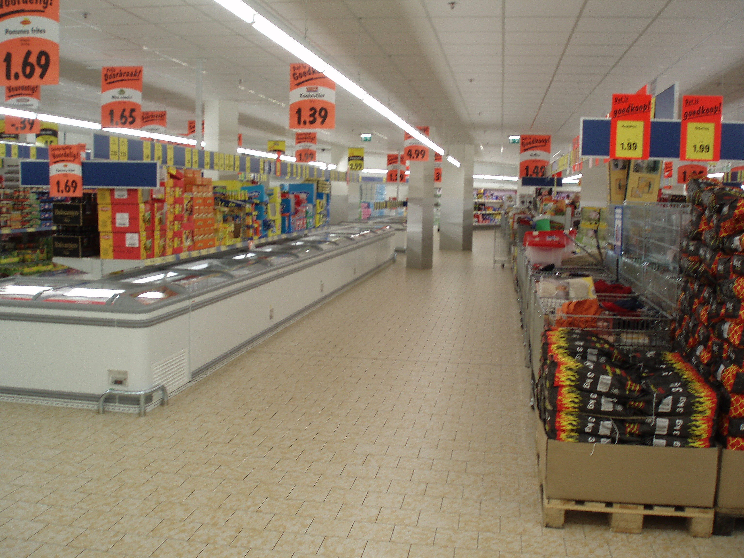 Filiaal van Lidl in de Zwolse woonwijk Diezerpoort.